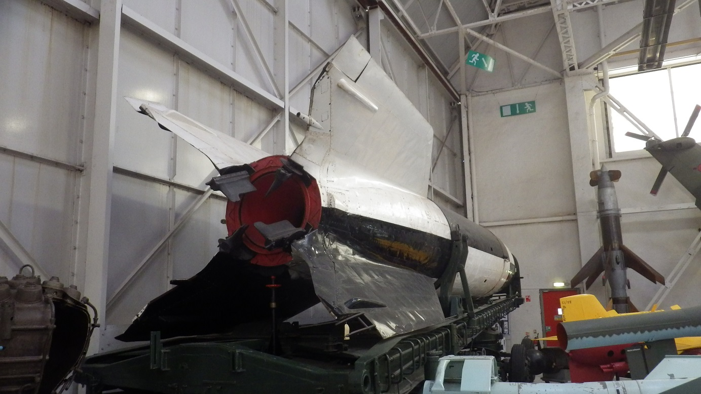 V-2 Rocket RAF Museum Cosford 2015年2月28日撮影